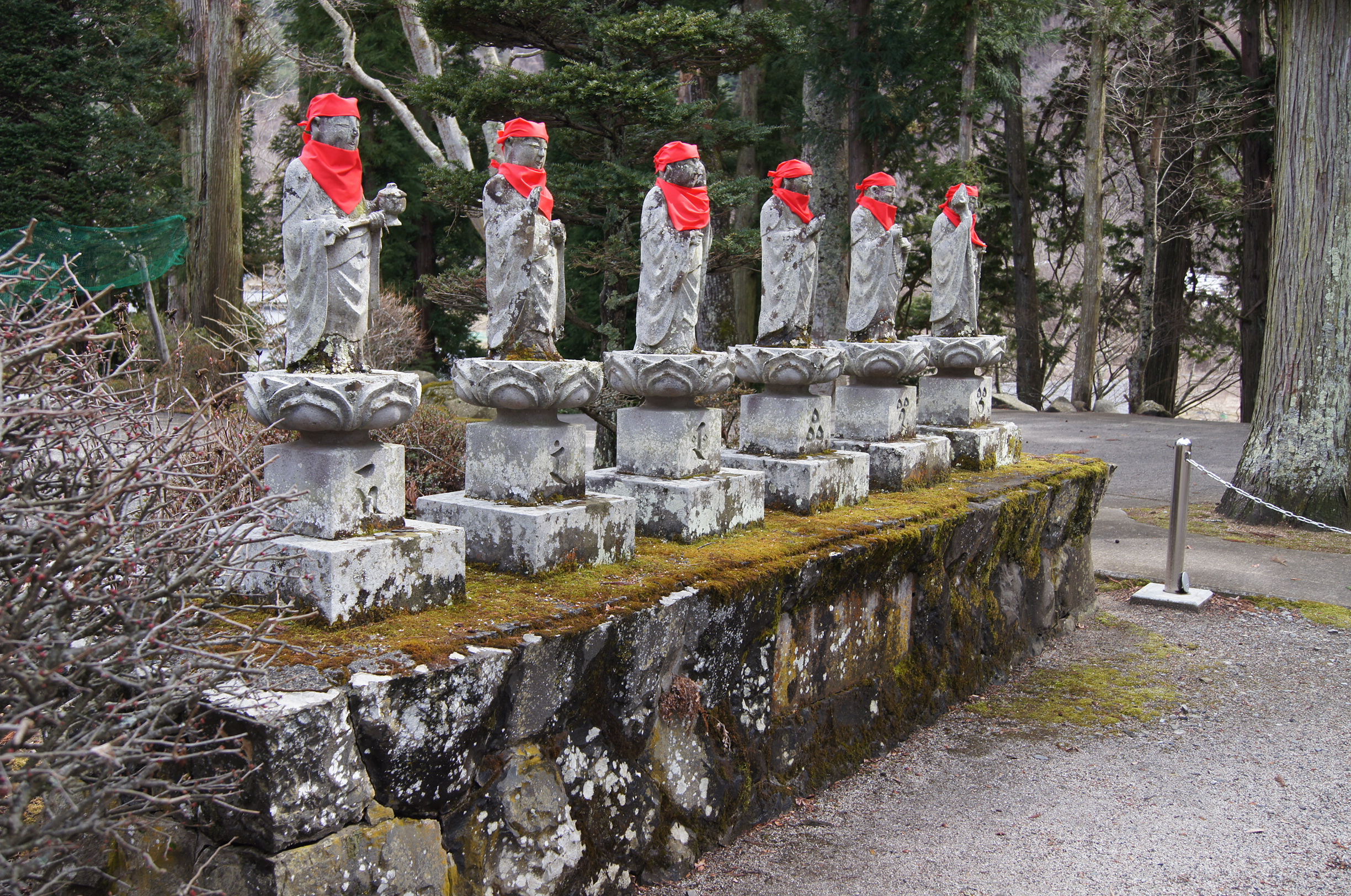 長野県松本市保福寺町にある保福寺の六地蔵。仁王門から石段を上がり、本堂などのある平地に上がると、右手にある。この画像は、本堂側から石段側に向かって撮影したもの。